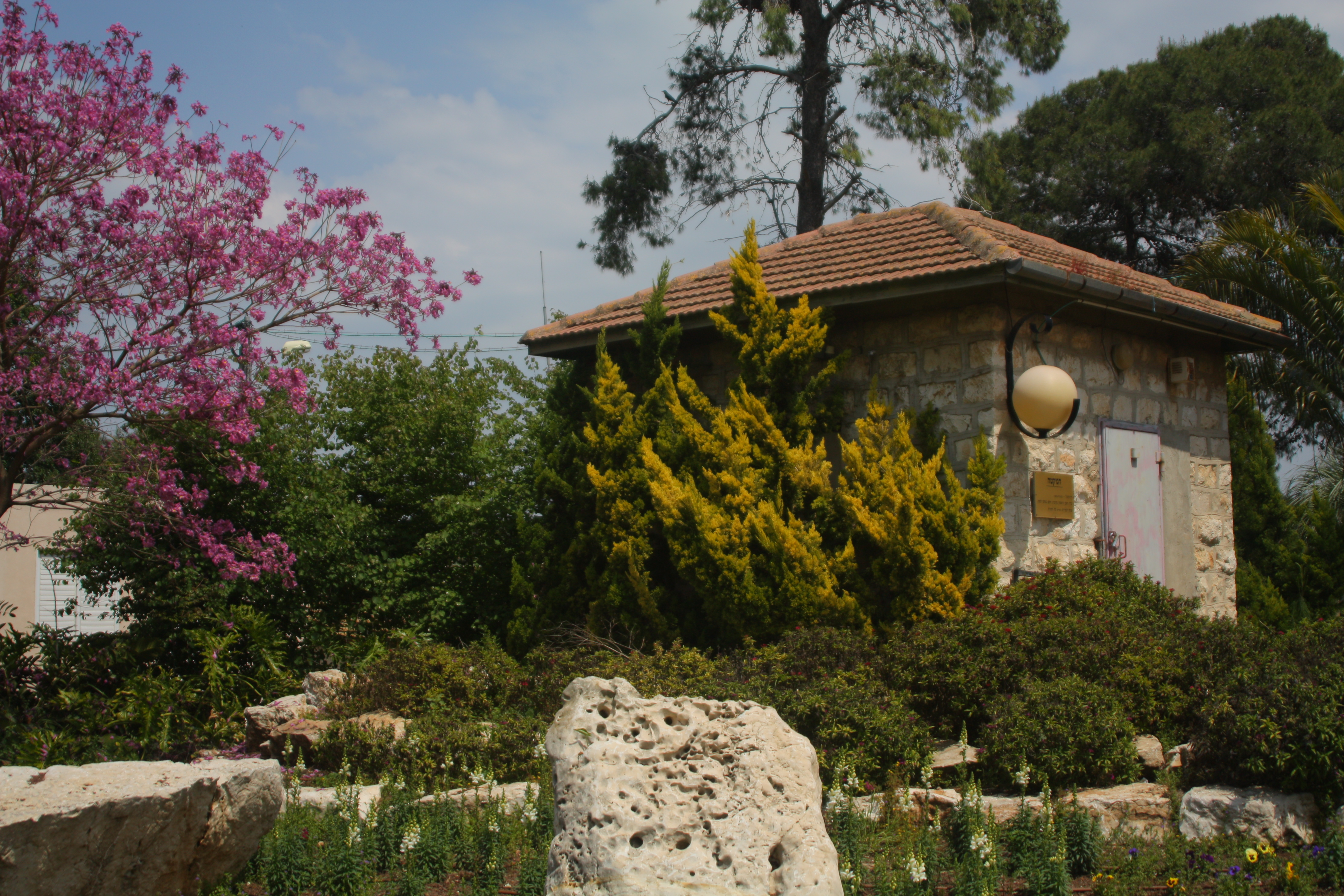 מבנה האבן הראשון במענית, ששימש כמחסן נשק